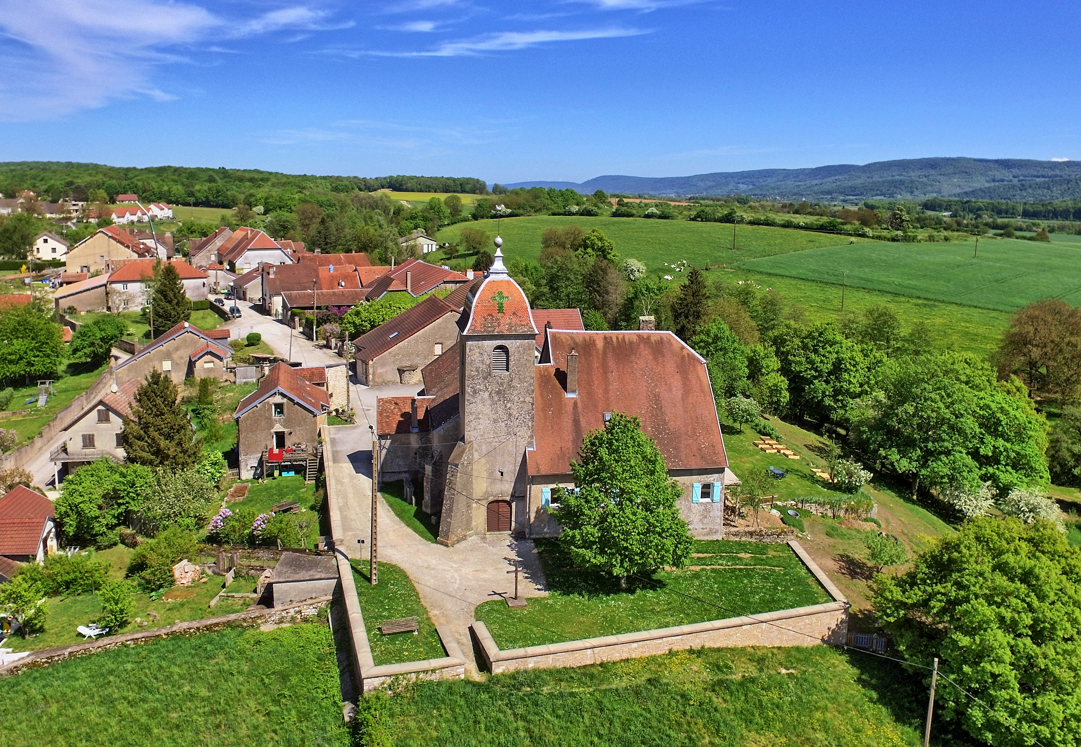 L'église sur son tertre